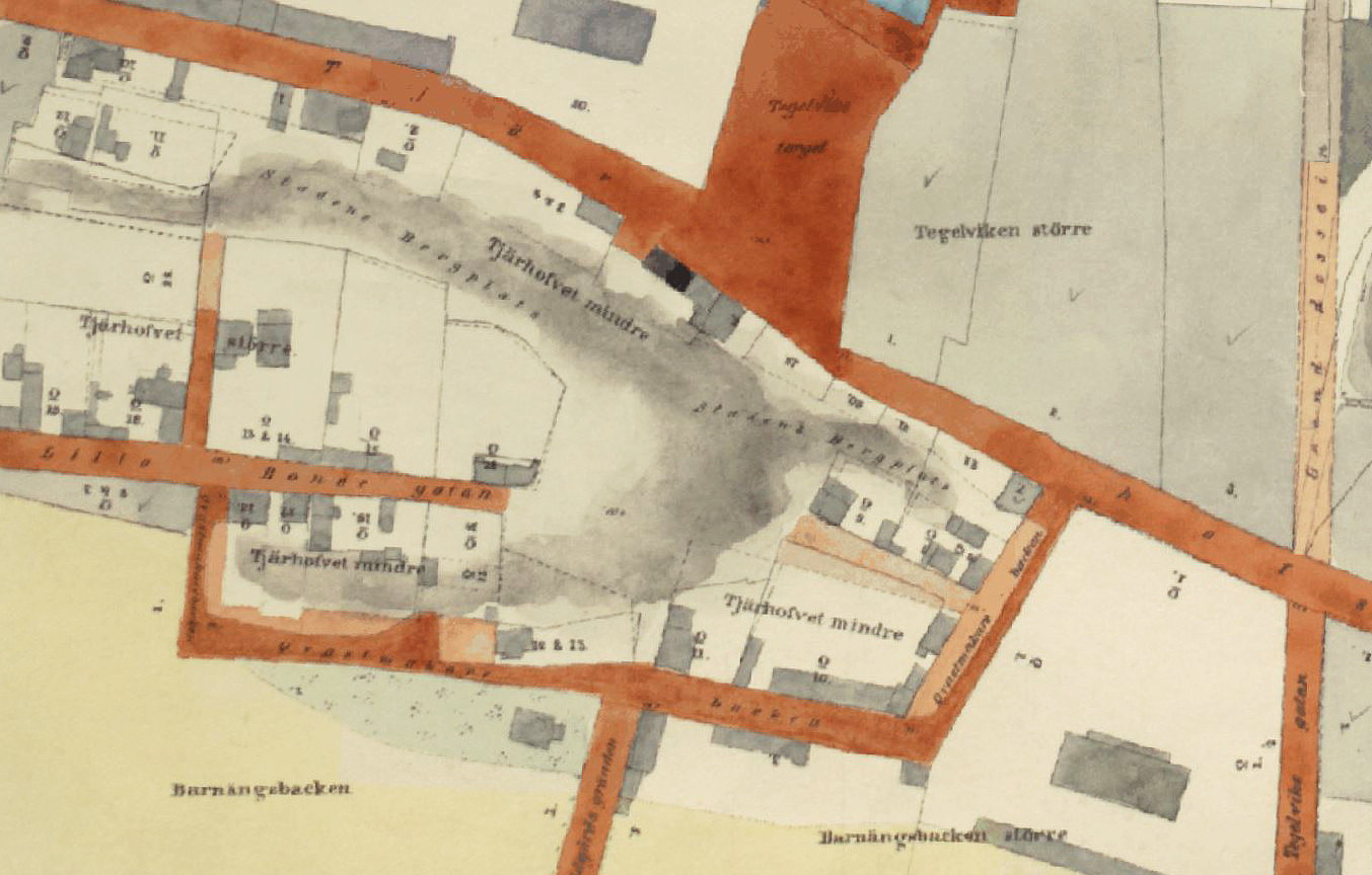 Del över Stockholmskartan visande Åsöberget med omgivning